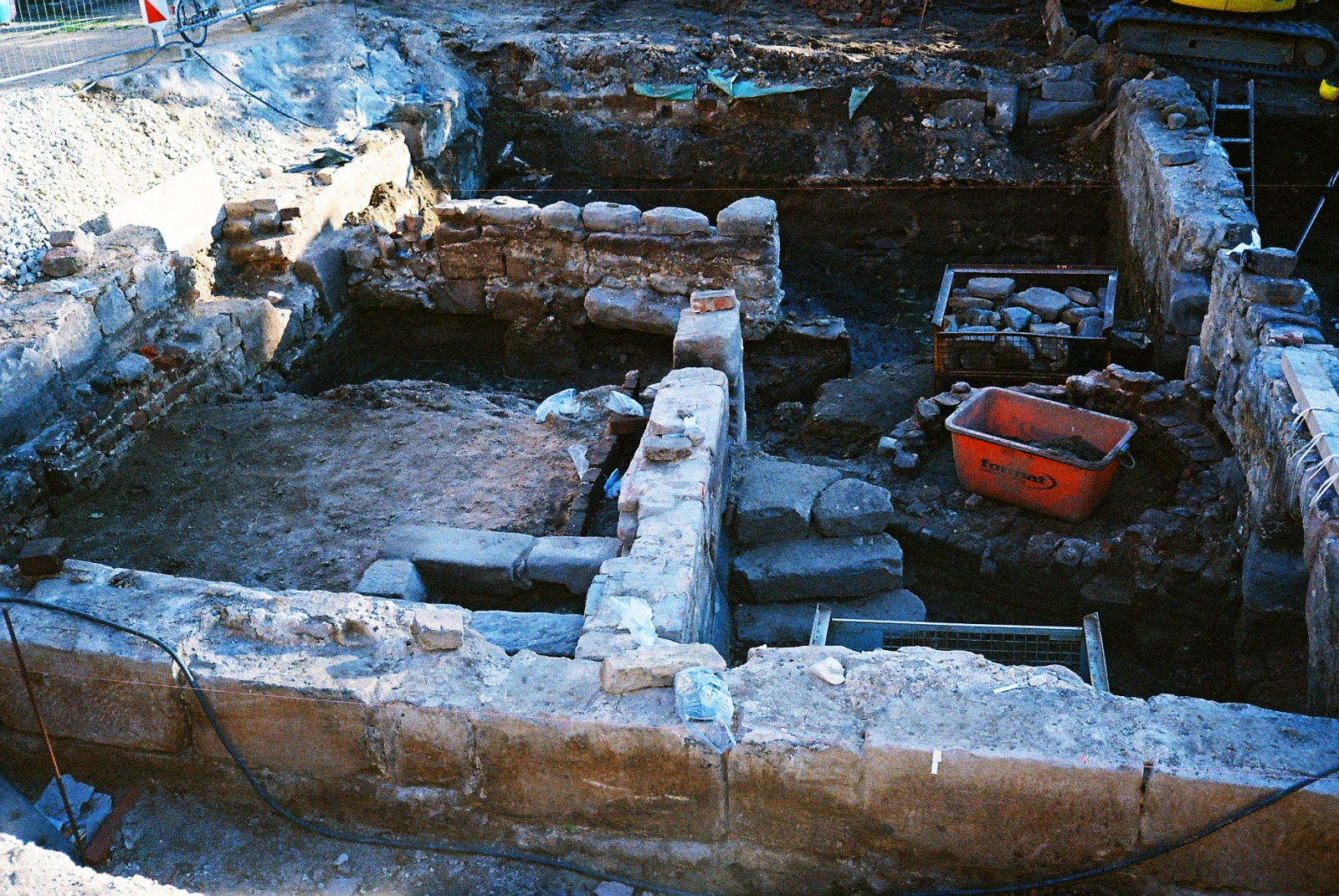 Grabung, Badhaus Wendelstein L September 2012, Blick von Osten